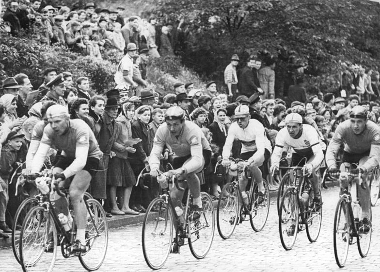 Friedensfahrt, Fahrerfeld, Zuschauer Zentralbild Wendorf 12.5.1961 XIV. Internationale Friedensfahrt Warschau-Berlin-Prag 1961.9.Etappe von Leipzig über Halle nach Karl-MArx-Stadt am 11.5.1961. UBz: Immer im Bilde waren auf der 9. Etappe die sowjetischen Fahrer. Stets waren sie in der Spitzengruppe zu finden und bestimmten das Tempo. (Vorn) Petrow, ihm folgt Melichow, Täve Schur (links in der letzten Reihe).